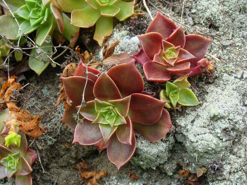 Dudleya stolonifera (Laguna Beach liveforever)